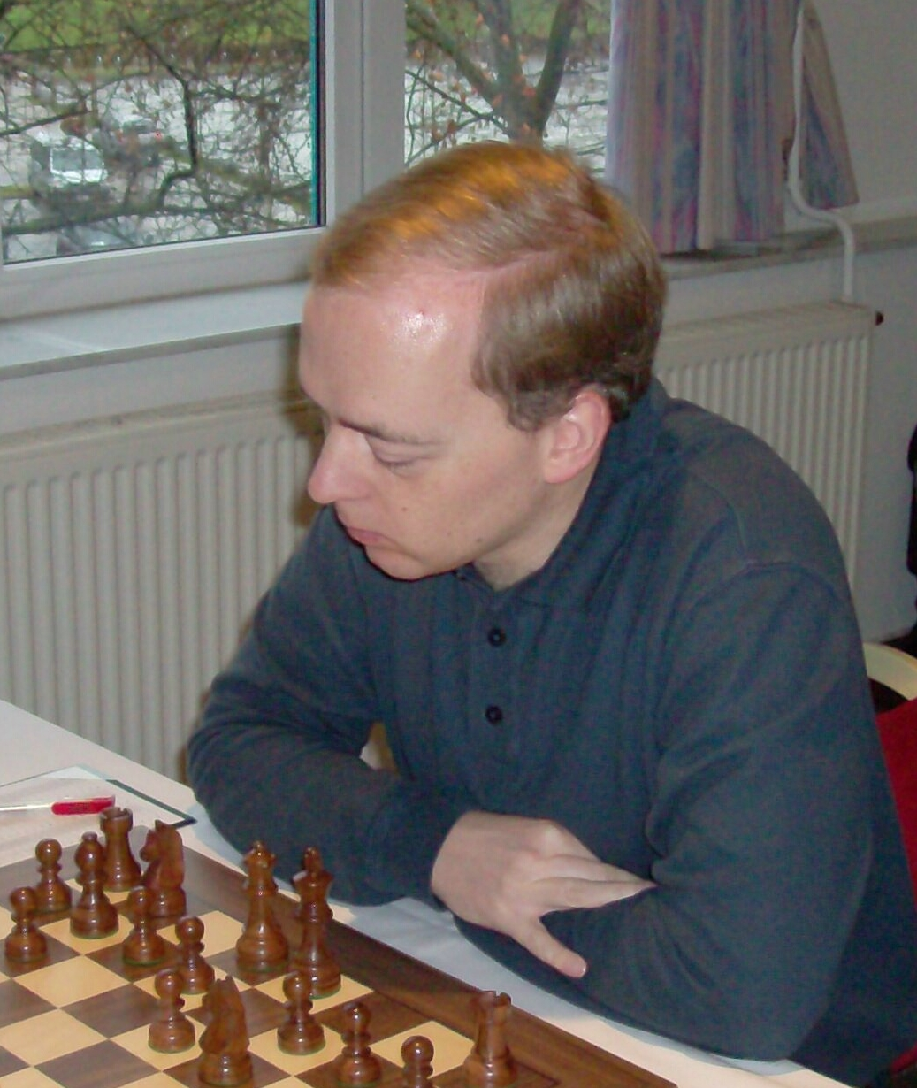 Thies Heinemann, international master in chess